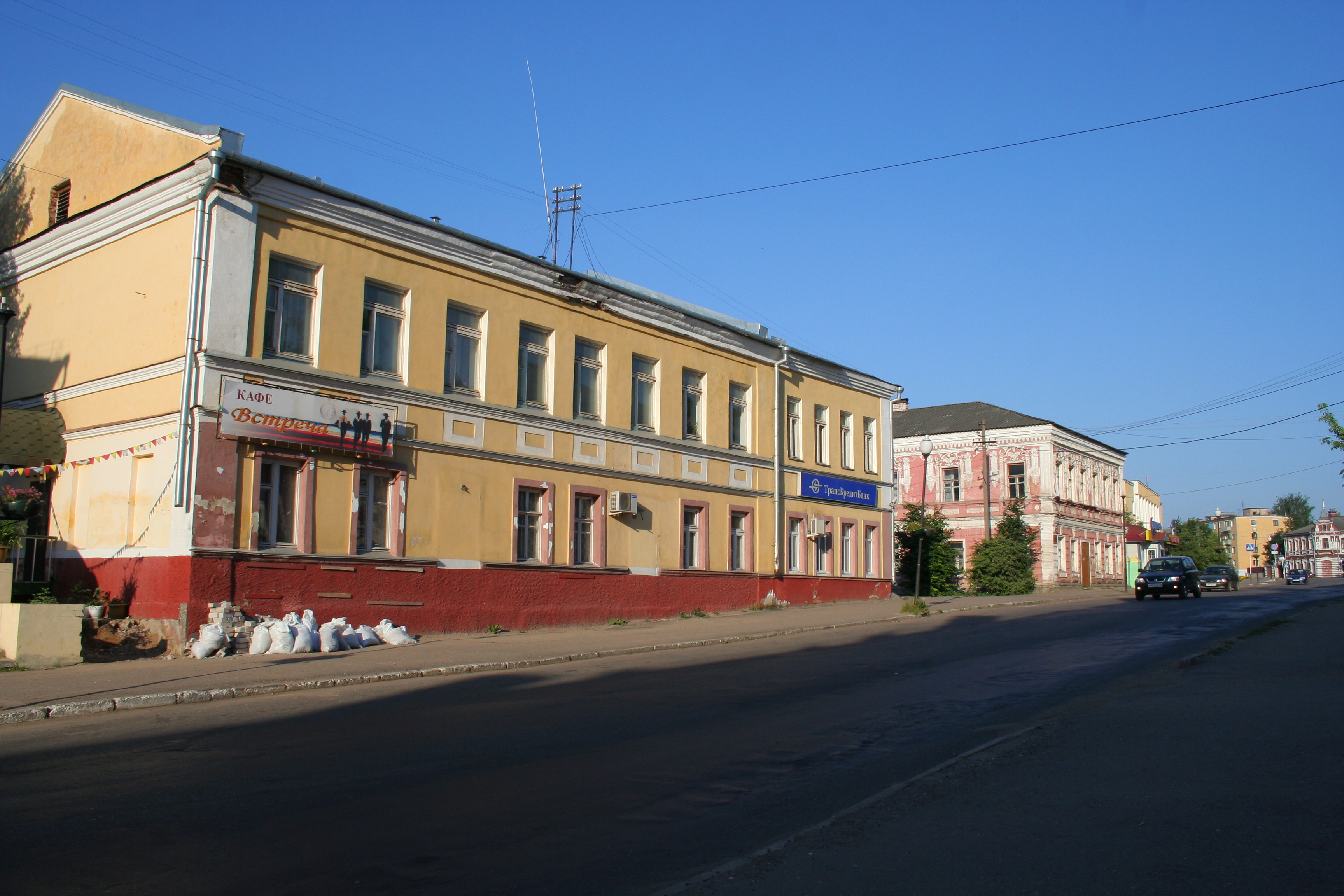 Im Zentrum von Bologoje (Oblast Twer, Russland). Architektur der Stadt am Beispiel der Kirow-Straße.